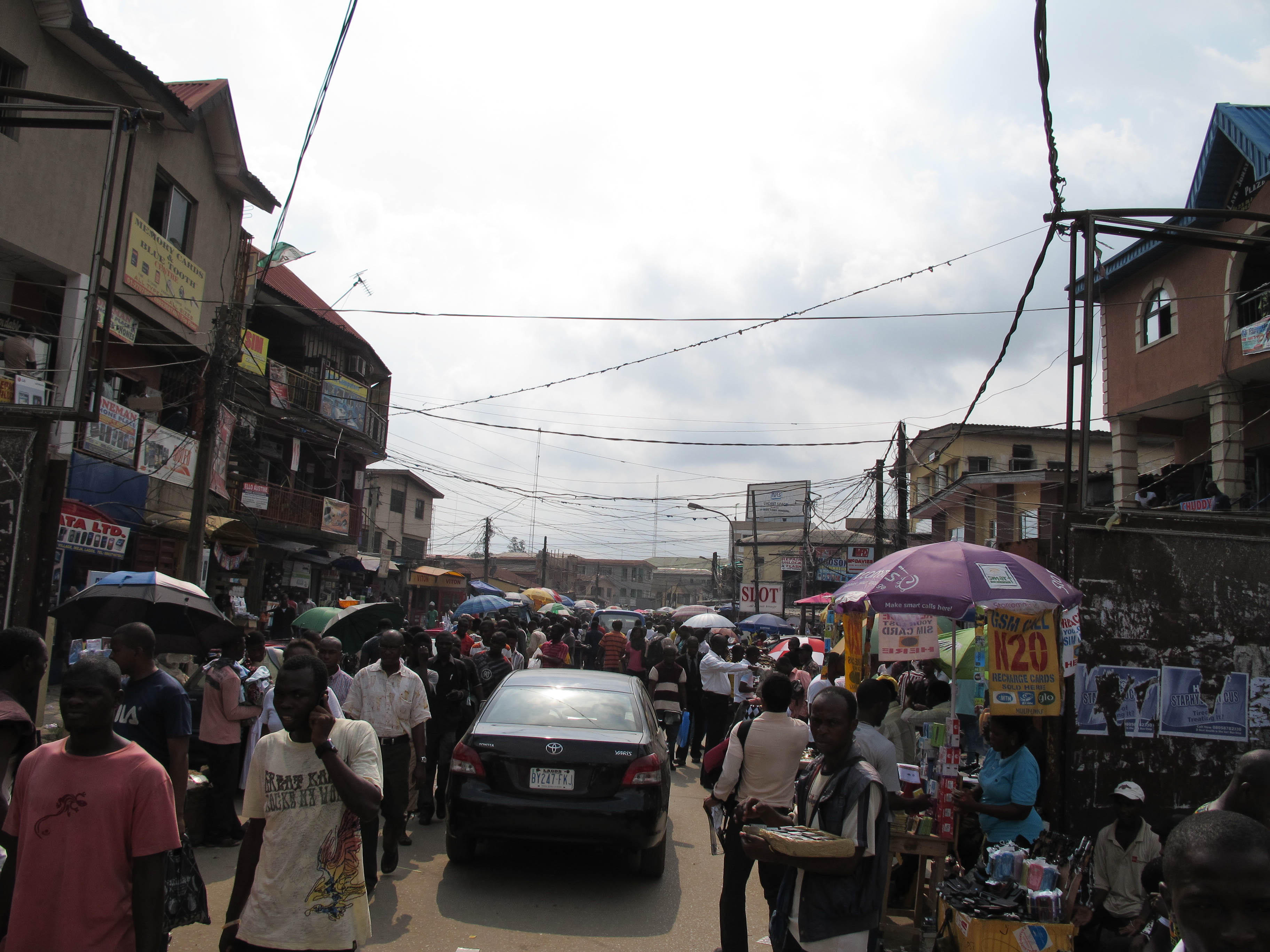 Lagos